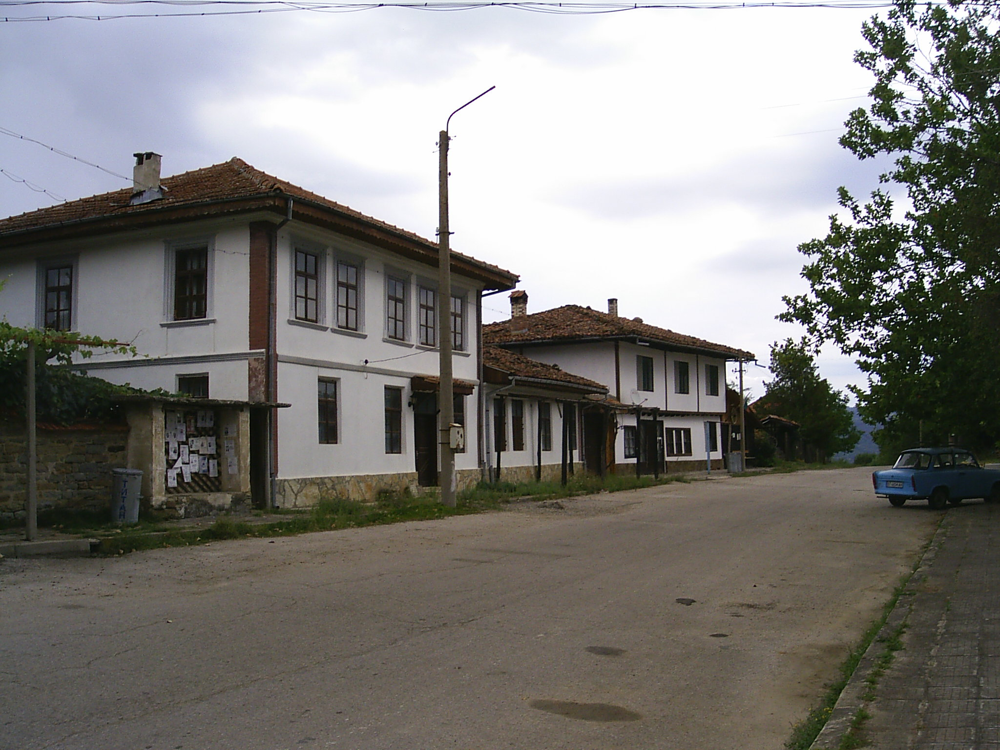 Изглед от Средни колиби, Великотърновско